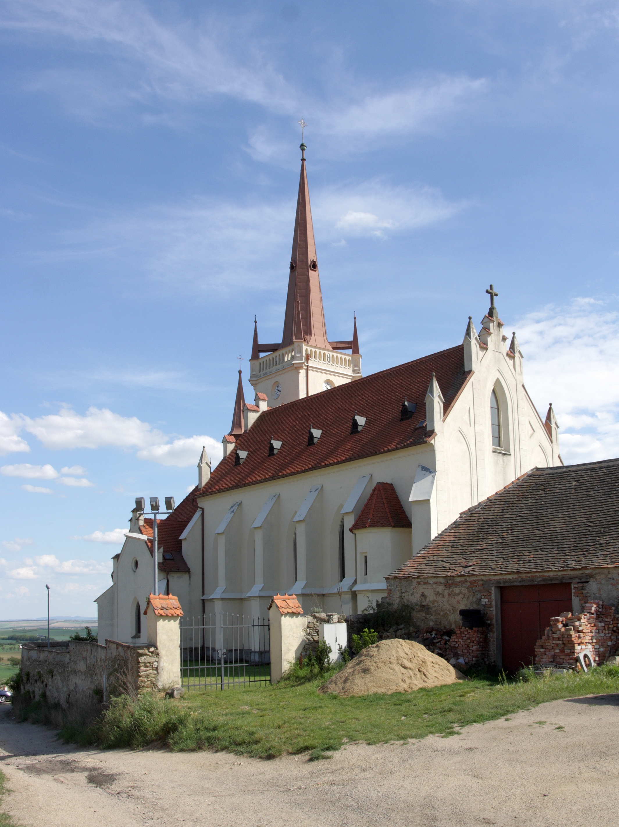 Konice (Znojmo) - kostel sv Jakuba Většího.